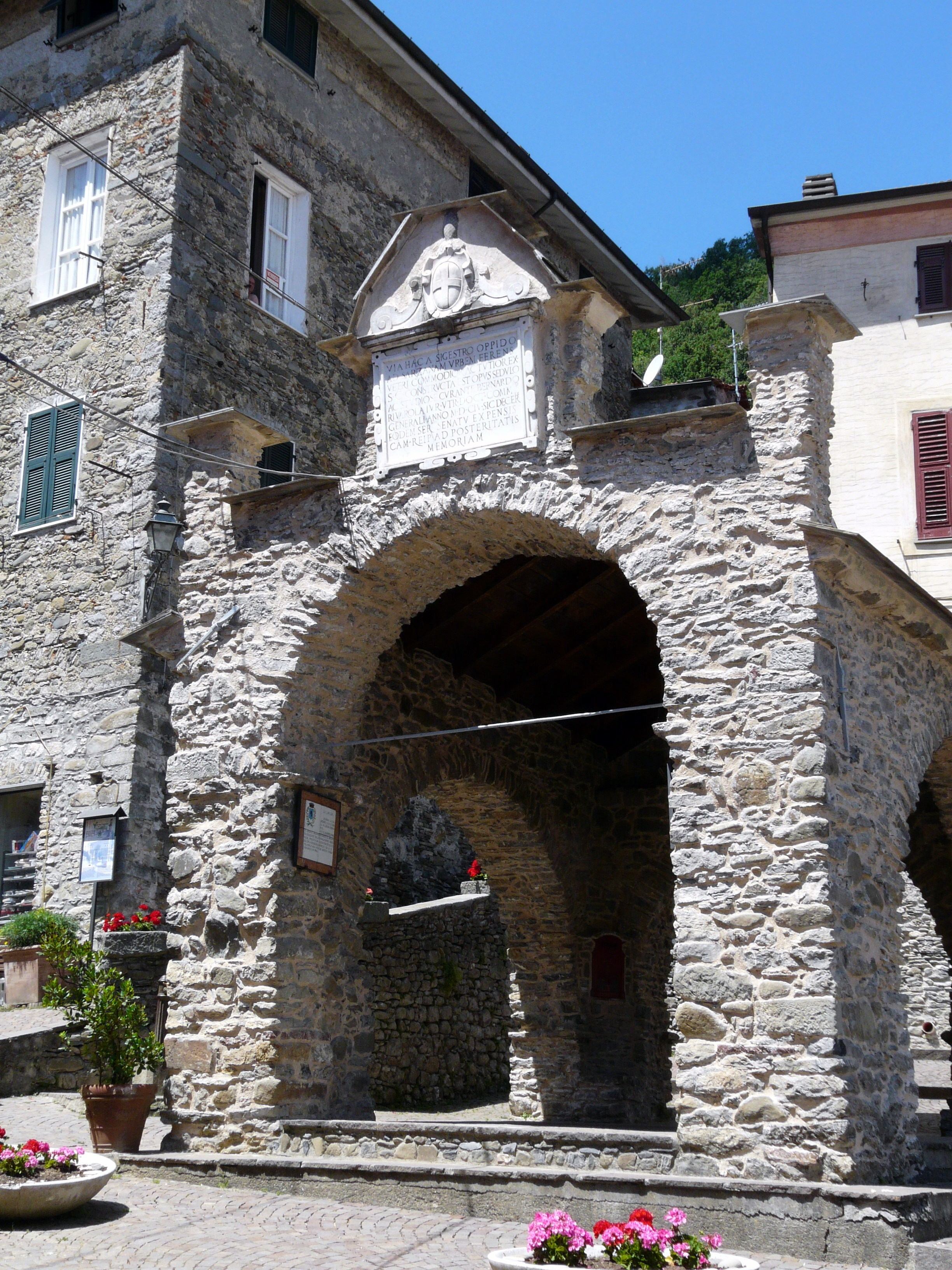 La loggia comunale, Pignone, Liguria, Italia